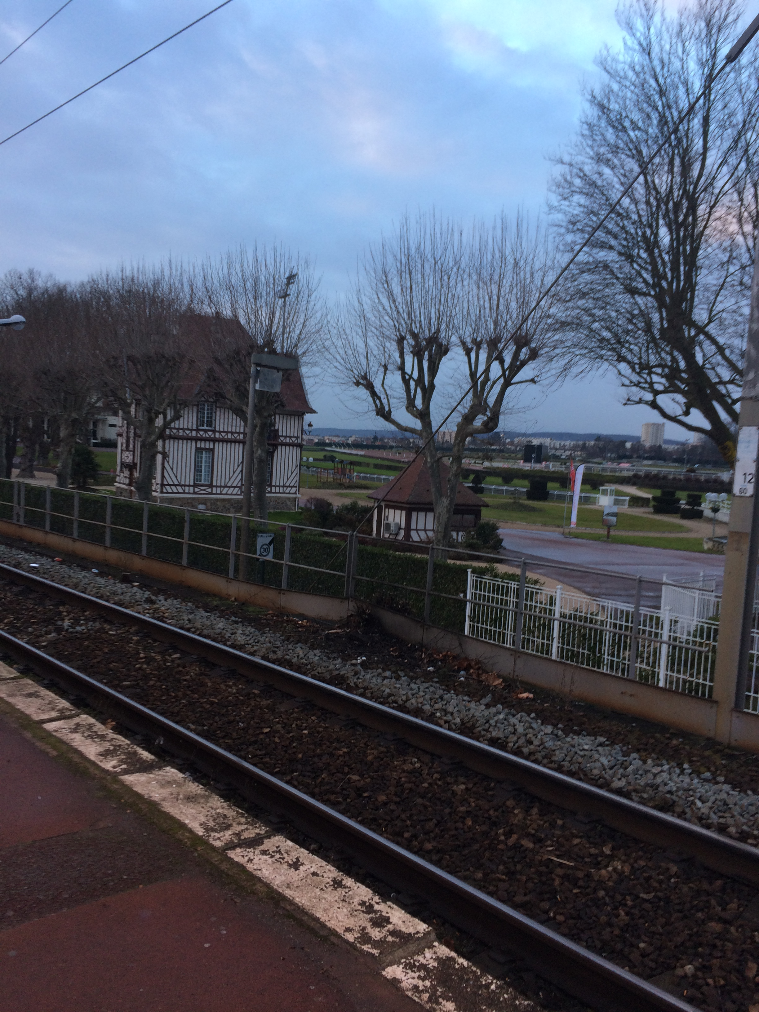 Vue du champ de courses d'Enghien depuis le quai de la gare du même nom, dans le département du Val-d'Oise, France, en direction de Paris-Nord.